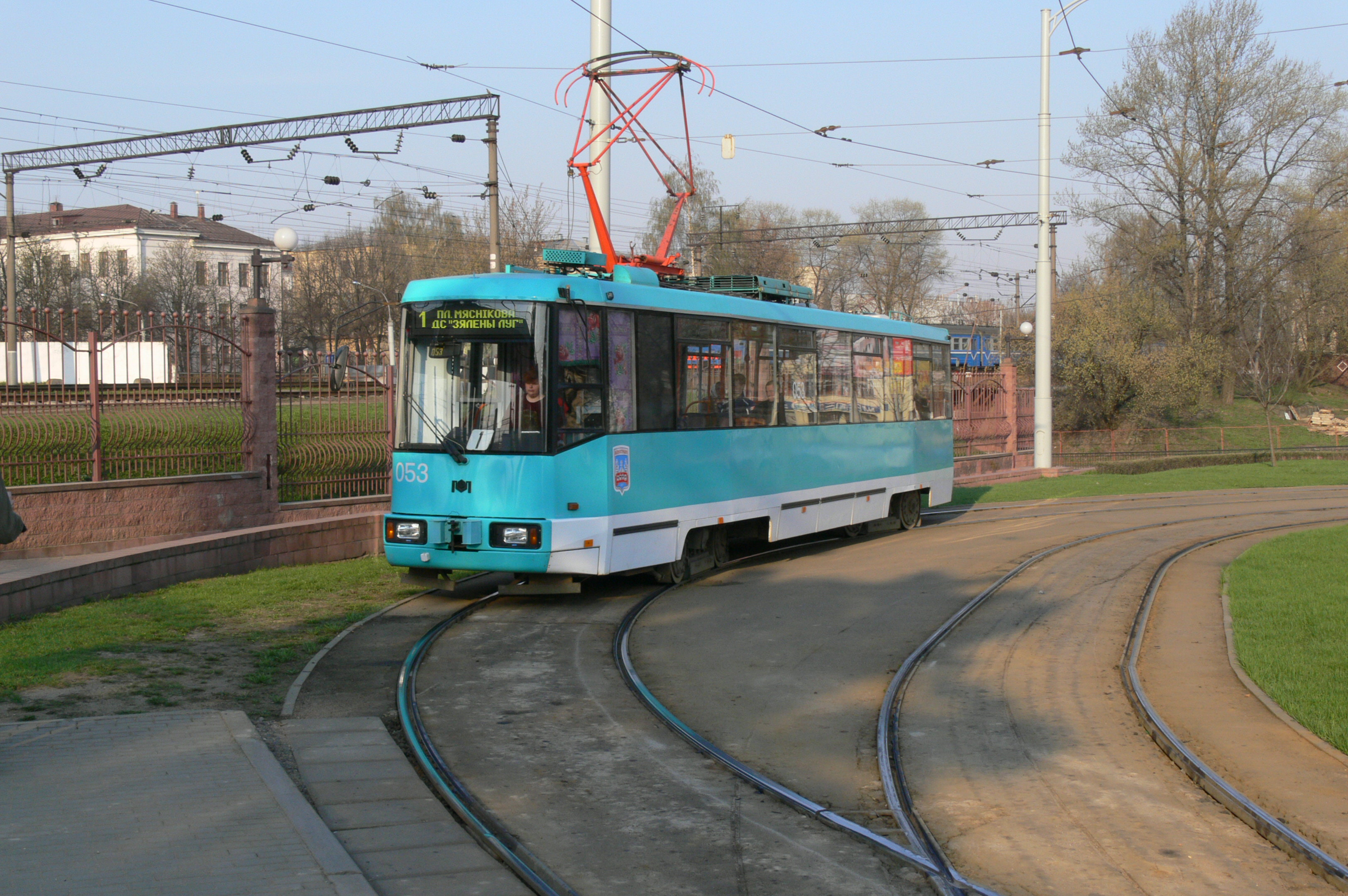 Белорусский трамвай AKCM-60102 в Минске.